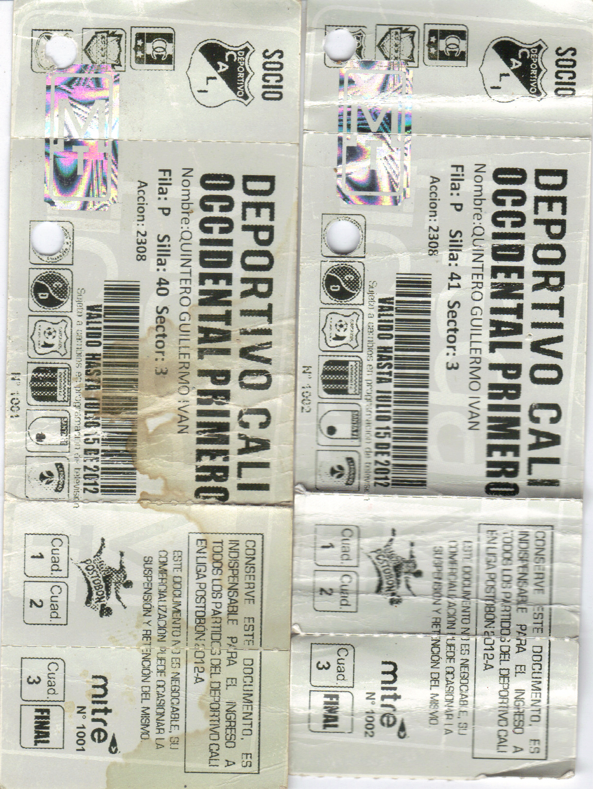 Boletería para socios del Super Depor. Validas para el Liga Postobón 2012-A